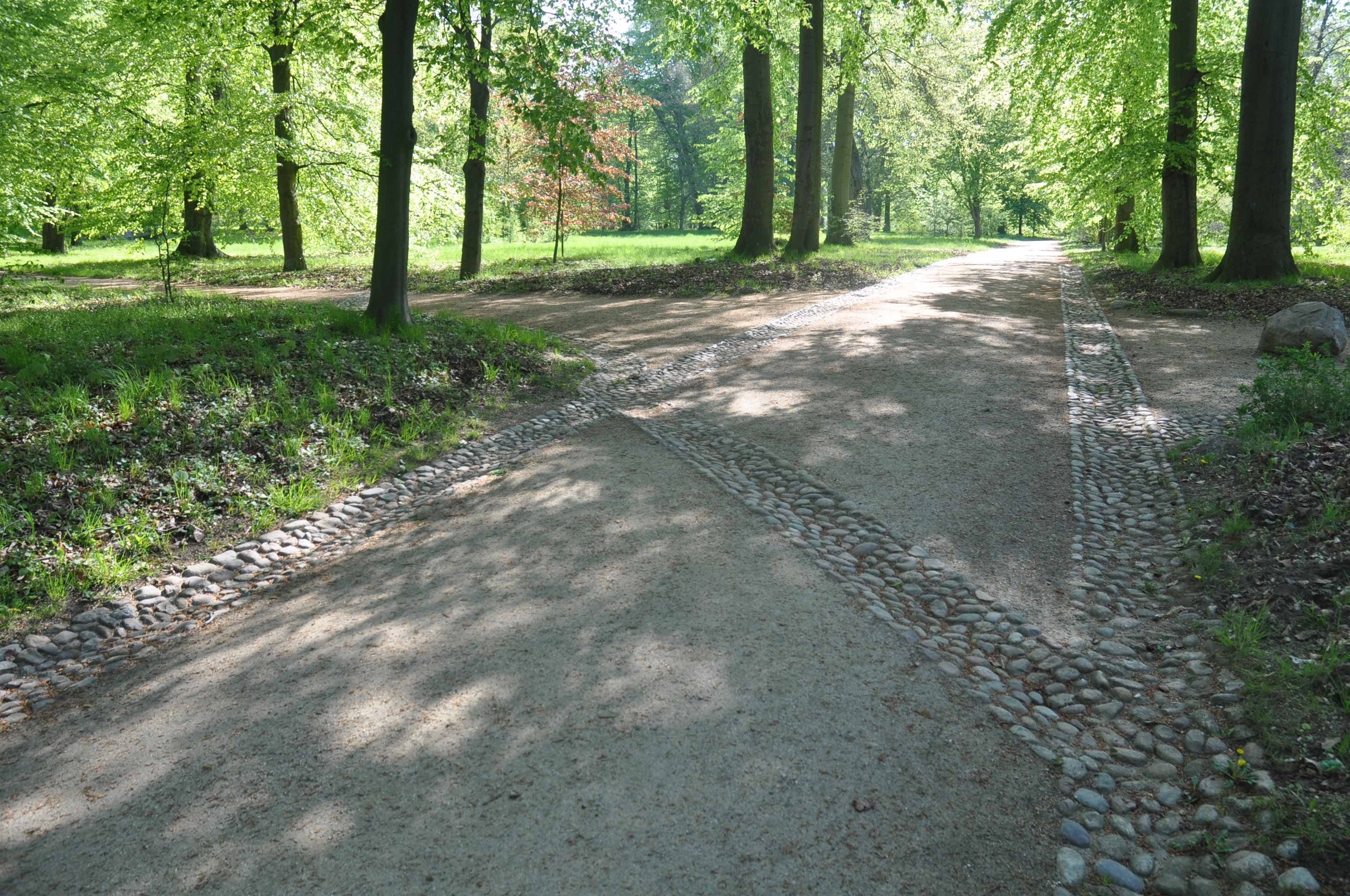 Park Klein-Glienicke, denkmalgerecht erneuerte Wege